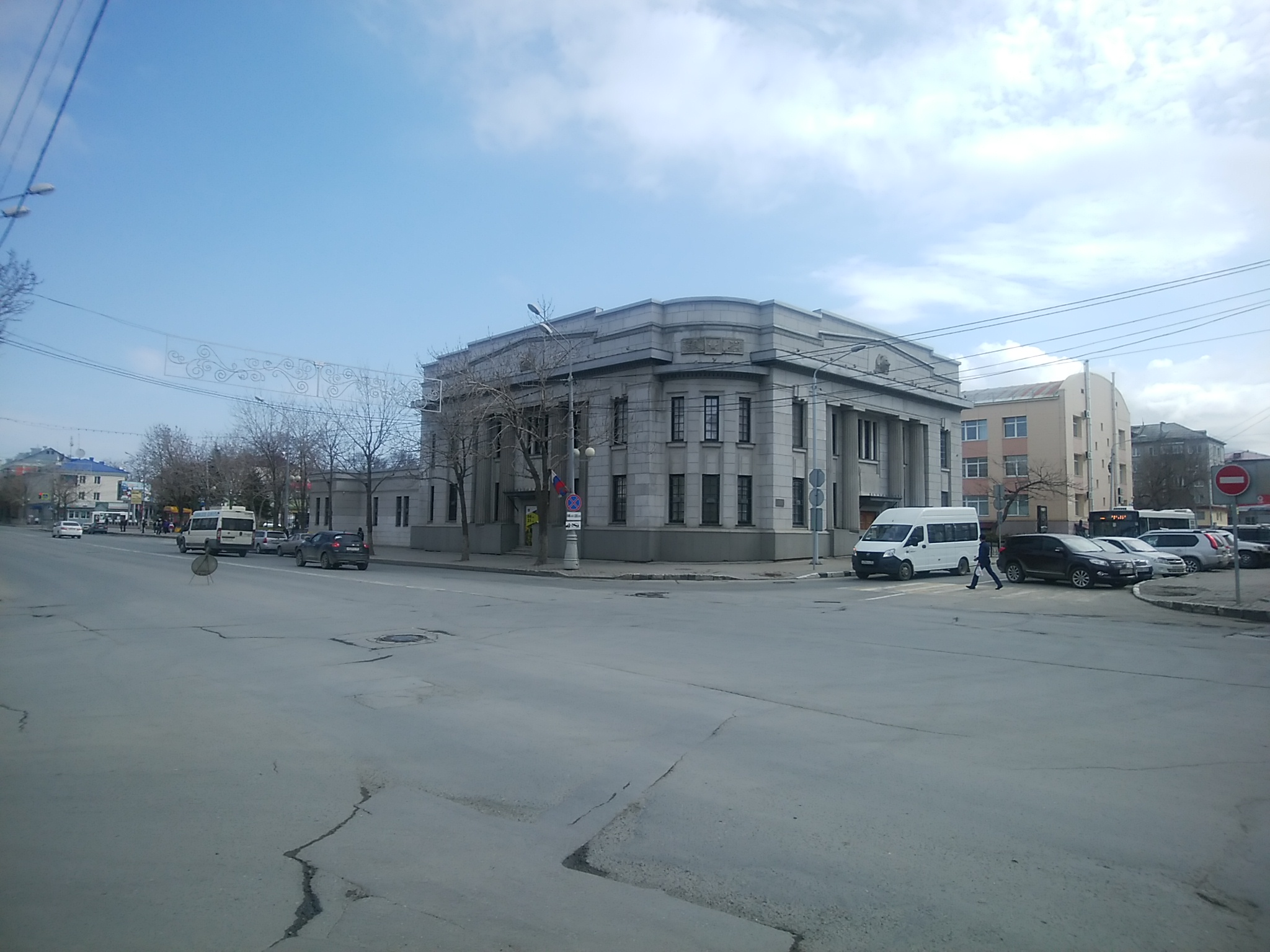 北海道拓殖銀行豊原支店（サハリン州立美術館） 2019/5/1撮影。